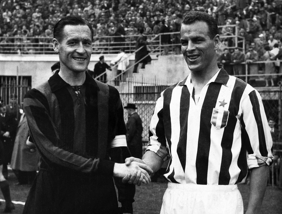 Milano, stadio San Siro, 29 marzo 1959. Da sinistra: la stretta di mano tra il centrocampista e capitano milanista Nils Liedholm, e l'attaccante juventino John Charles, in occasione della classica tra Milan e Juventus (1-1) valevole per la 25ª giornata del campionato italiano di Serie A 1958-59.